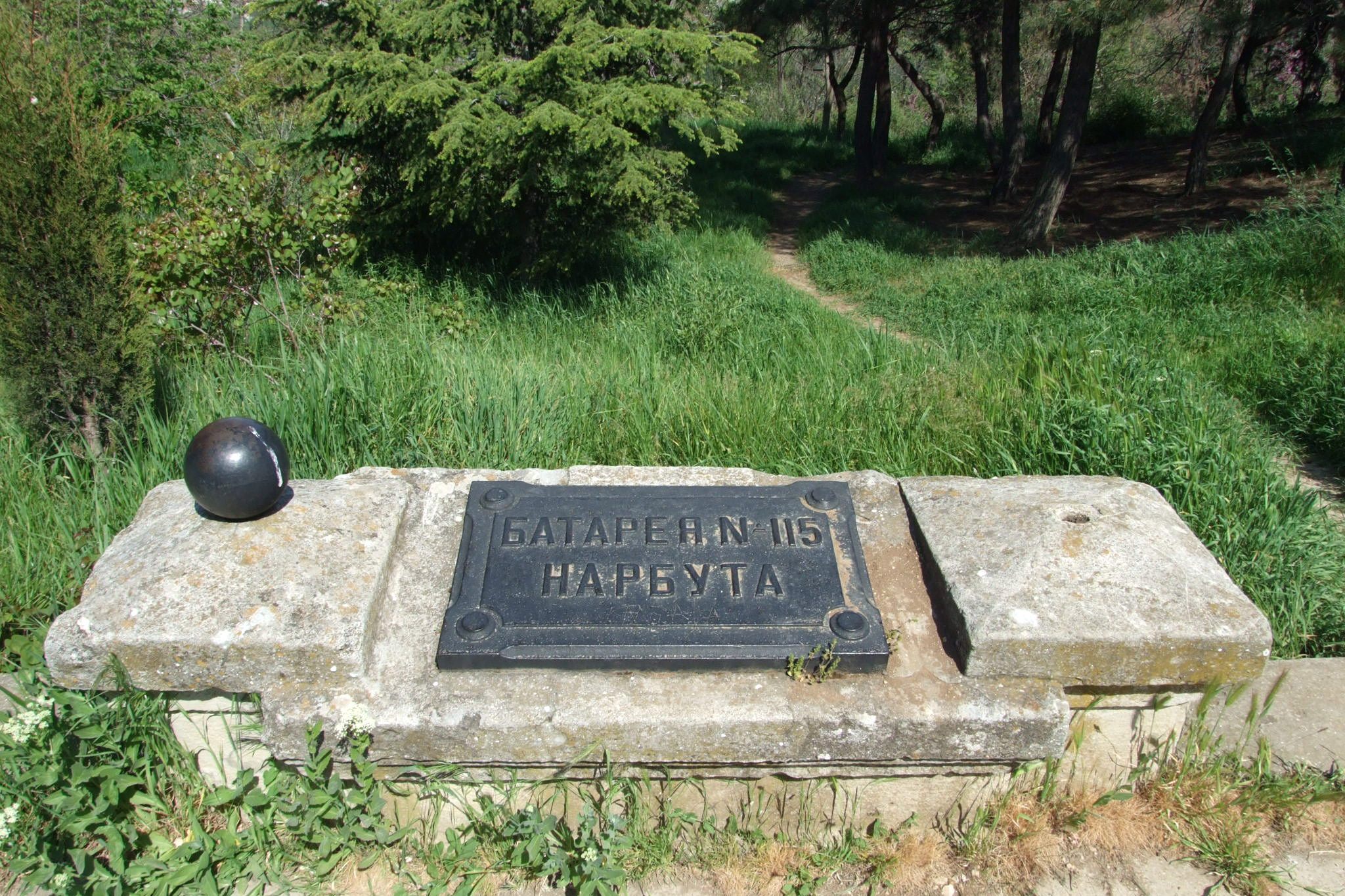 Меморіальний комплекс пам'яток оборони міста в 1854 - 1855 роках "Історичний бульвар" 1905 - 1959 роки